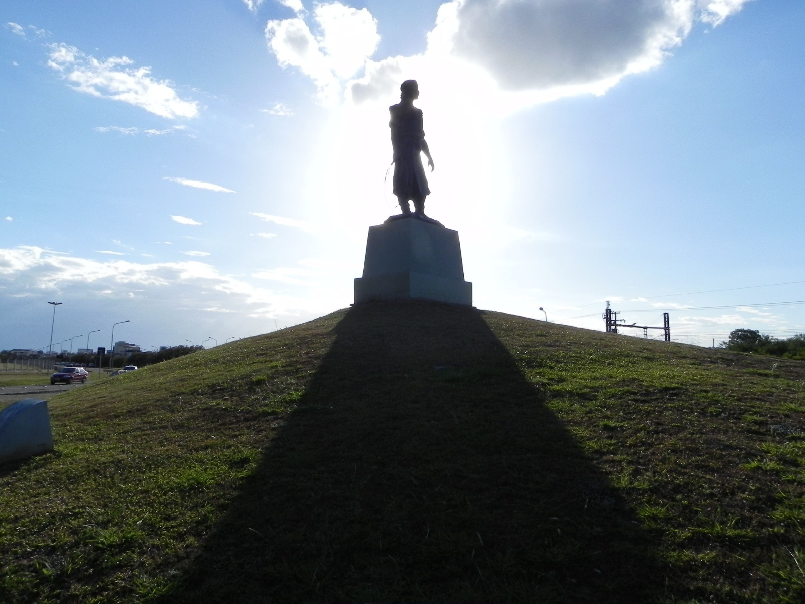 Monumento Laçador, símbolo Gaúcho